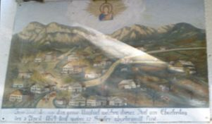 Votivbild